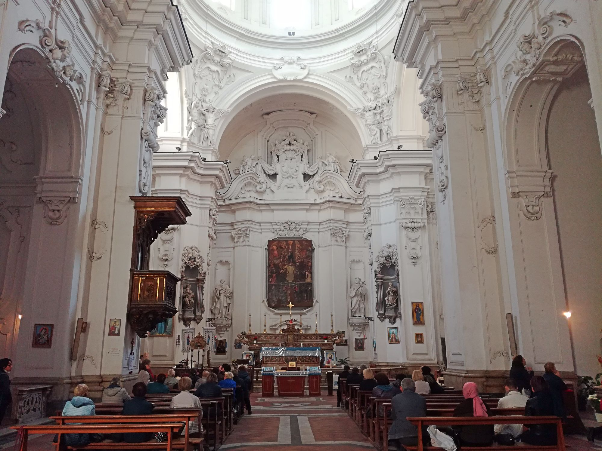 Interno Santa Maria della Pace (Napoli)